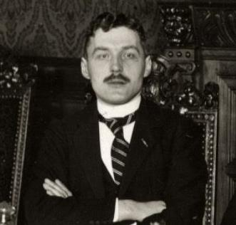 Jan Donner (1891-1981), Nederlands politicus